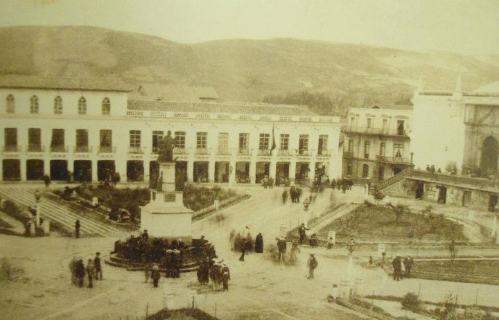 Panorámica de la Plaza Grande de Quito, desde el Palacio de Carondelet. Fotografía de 1892.